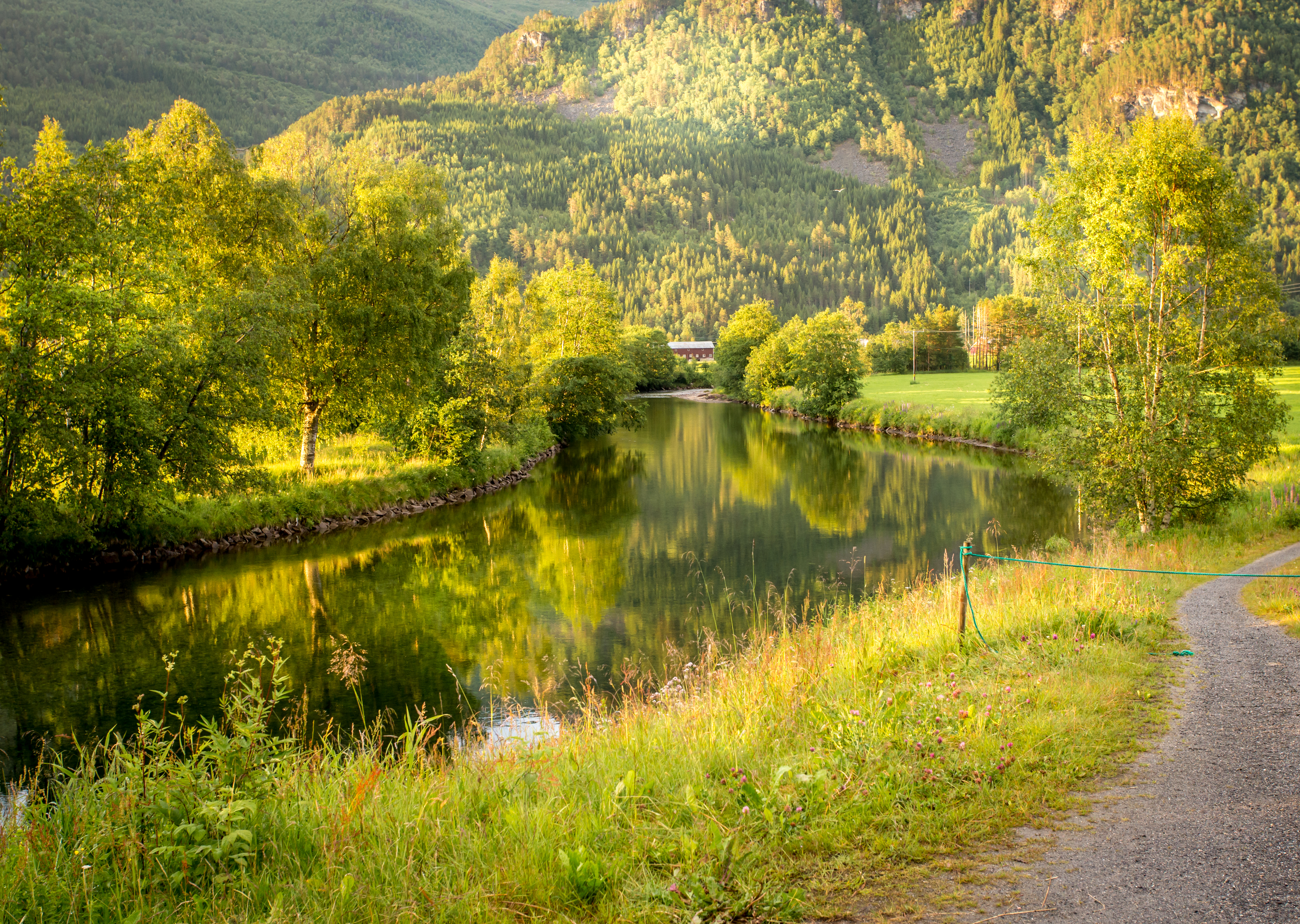 Todalen